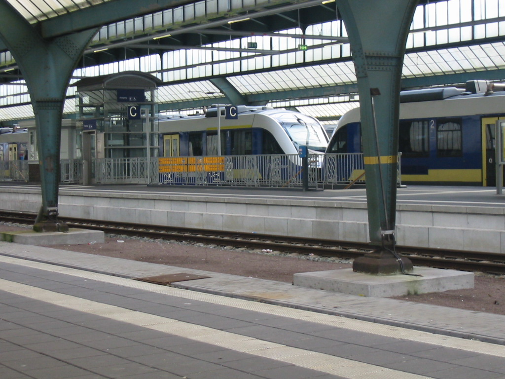 NordWestBahn in Oldenburg Hauptbahnhof